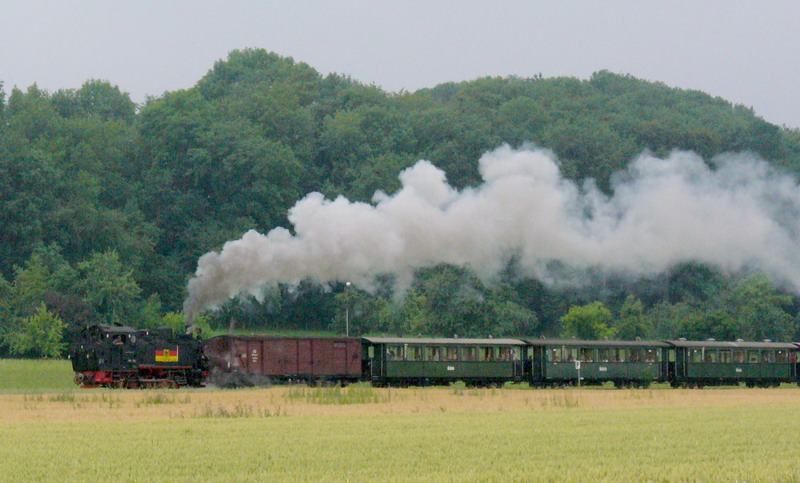 Oechsle (Schmalspurbahn)- in Herrlishoefen